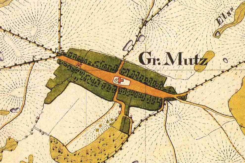 Karte von Großmutz, Kreis Ruppin, Provinz Brandenburg, 1825